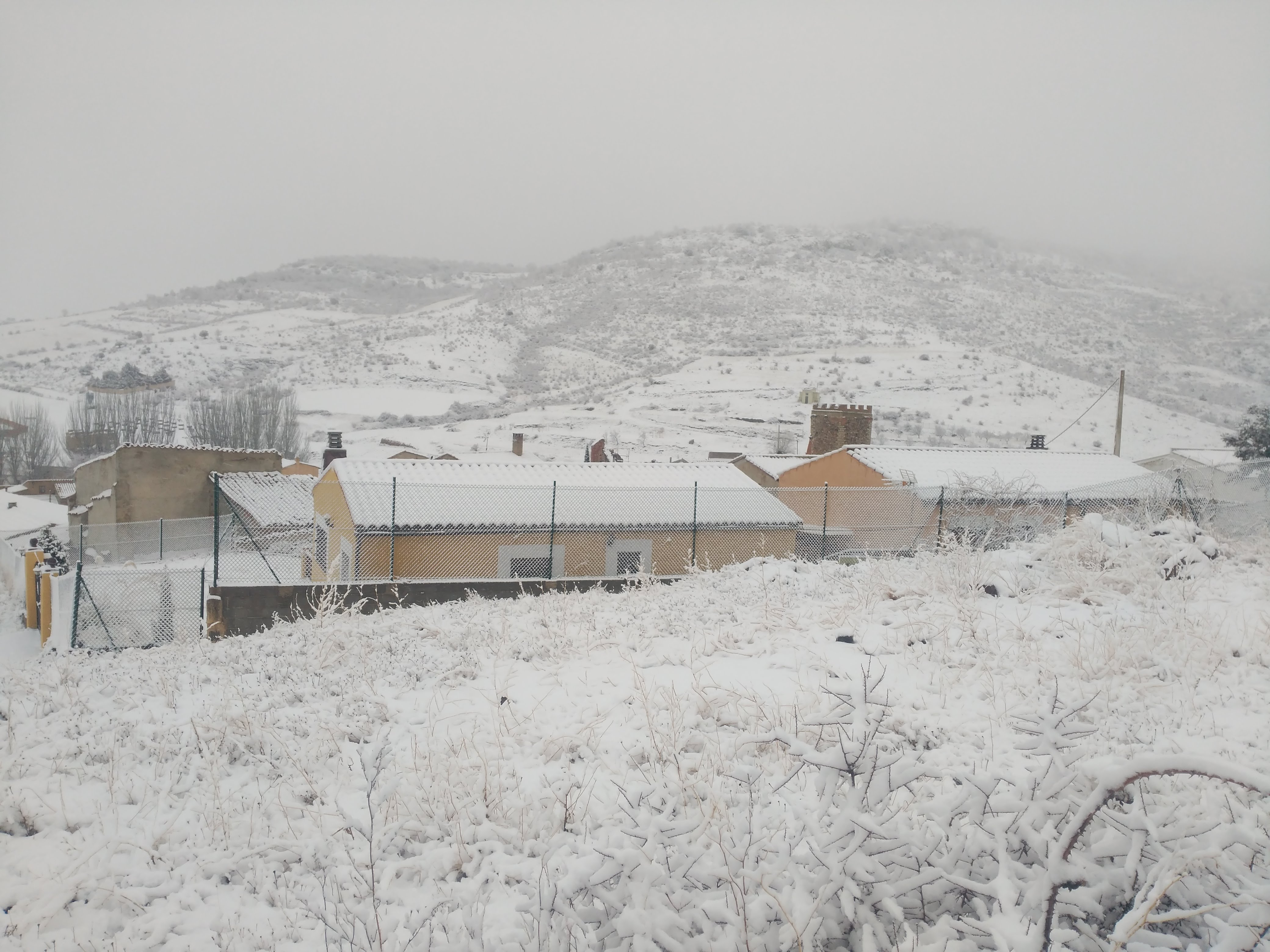 Bádenas en invierno con nieve